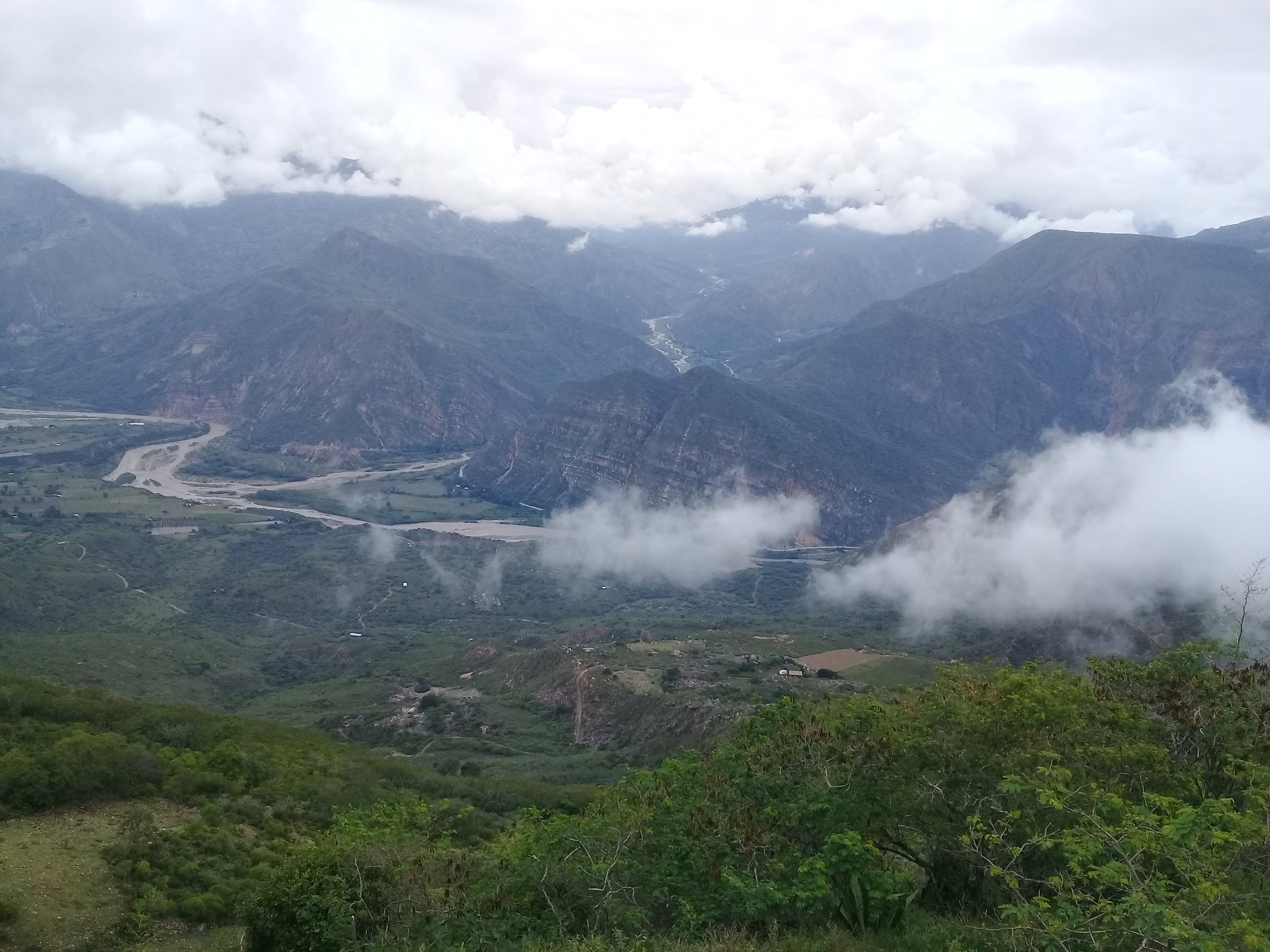 Quebrada de Vera o Rio Tequiano como es llamado en la region. Es un torrente que baña la vereda de vera en Capitanejo Santander Acabando en el Rio Chicamocha.